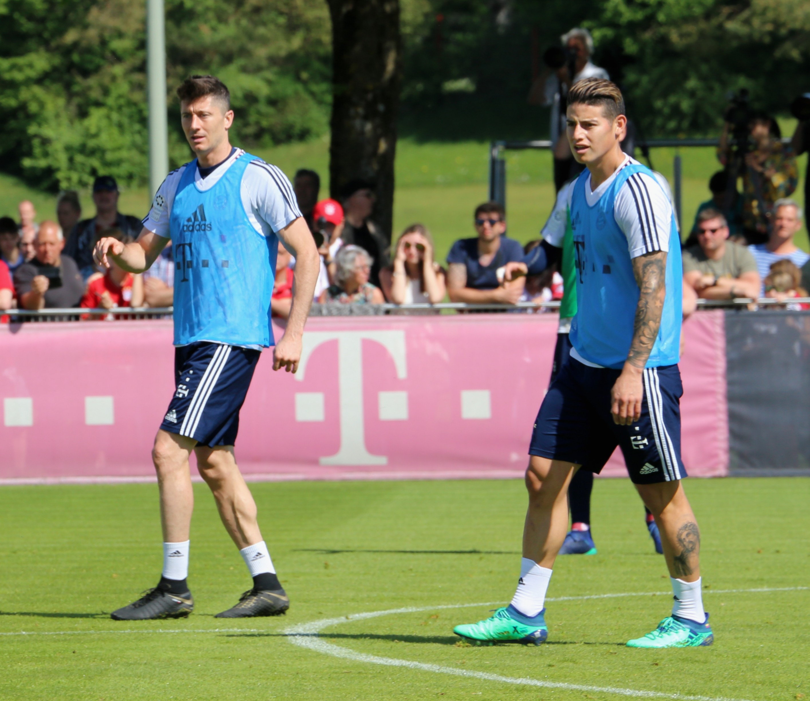 Robert Lewandowski und James Rodríguez, am 8. Mai 2018 beim Training auf dem Gelände des FC Bayern München